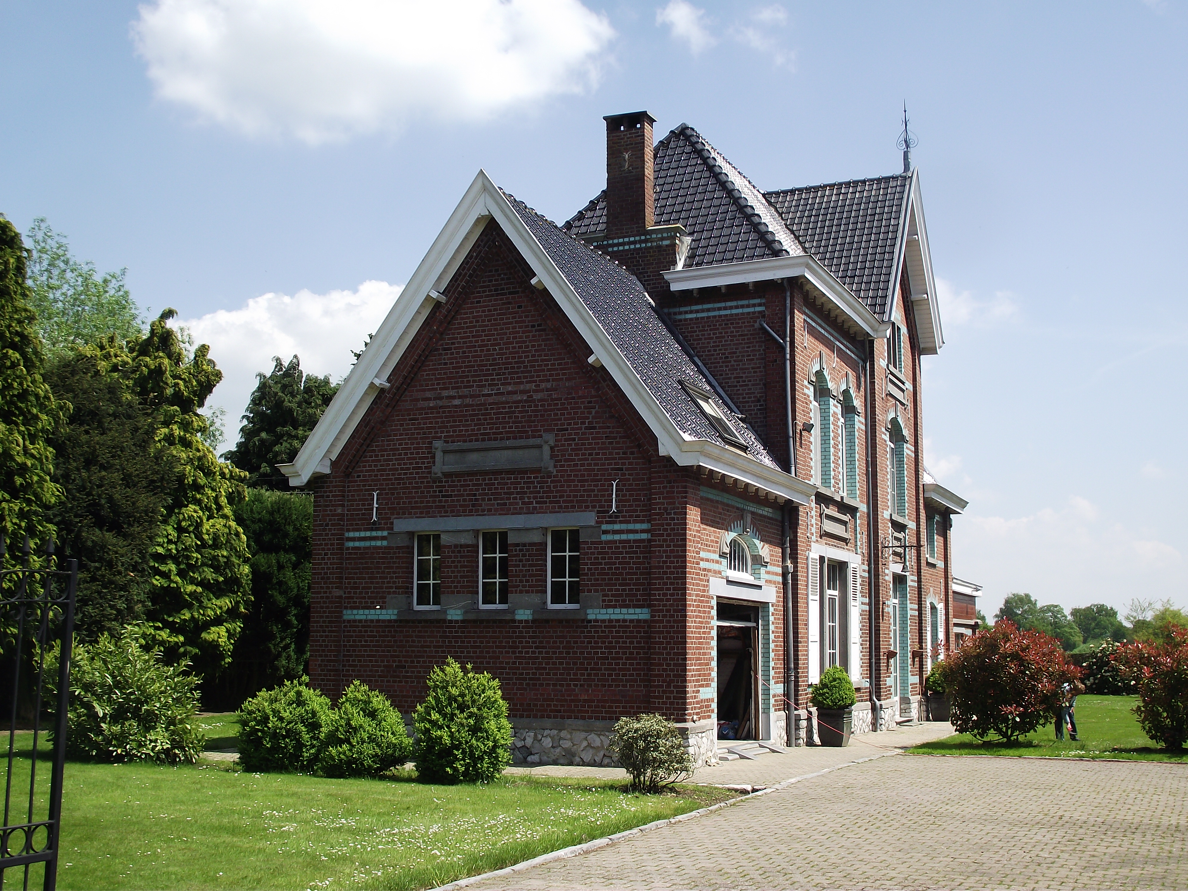 De vroegere stelplaats en station van de buurtspoorwegen in Sart-Risbart. De stationsgebouwen zijn nu bewoond en privé eigendom. Hier het hoofdgebouw met wachtzaal en loket.